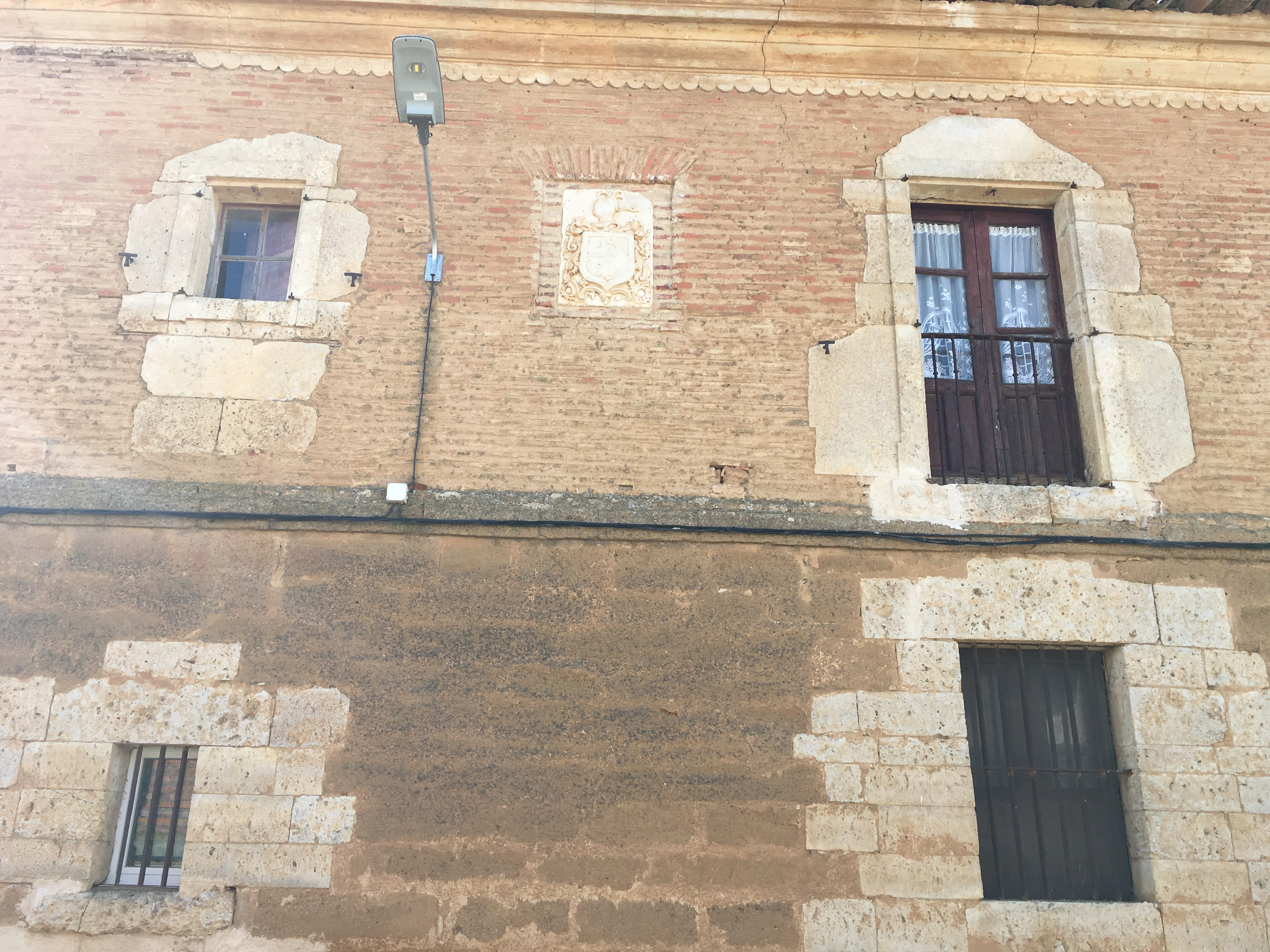 Villaesper Milenario